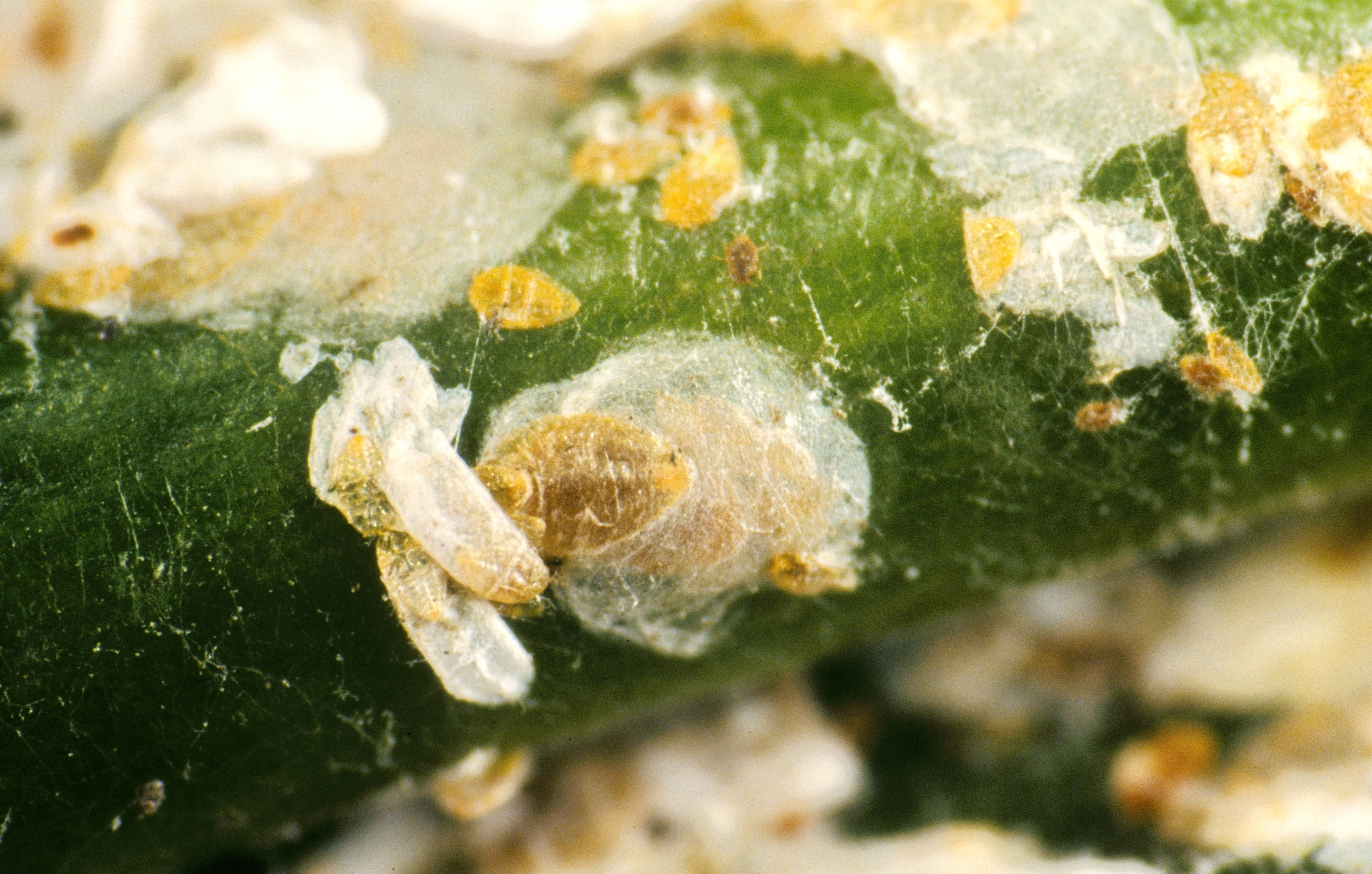 Adult(s) of Aulacaspis yasumatsui Takagi, 1977